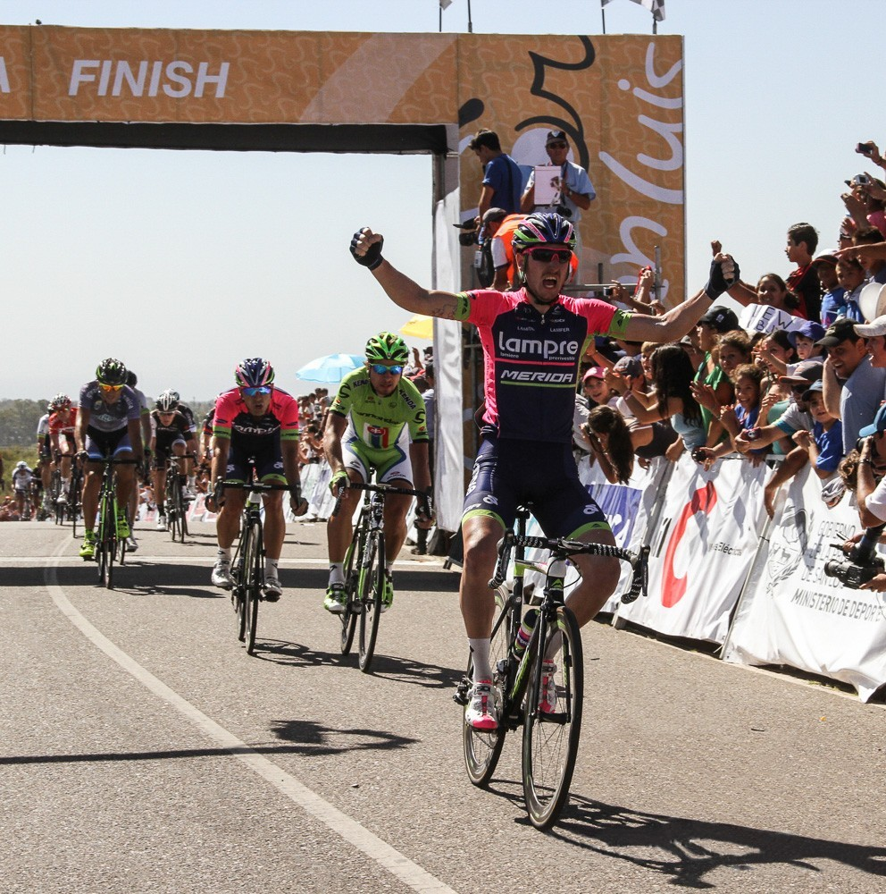 Sacha Modolo bate en el sprint a Peter Sagan y Maxi Richeze. Séptima etapa del Tour de San Luis 2014